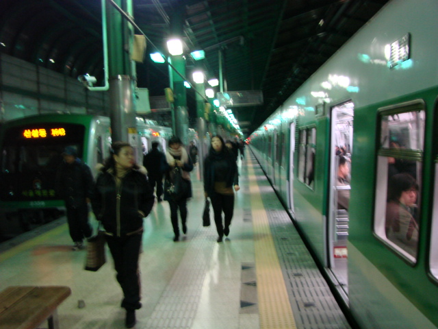 성수역의 본선과 성수지선 환승 장면